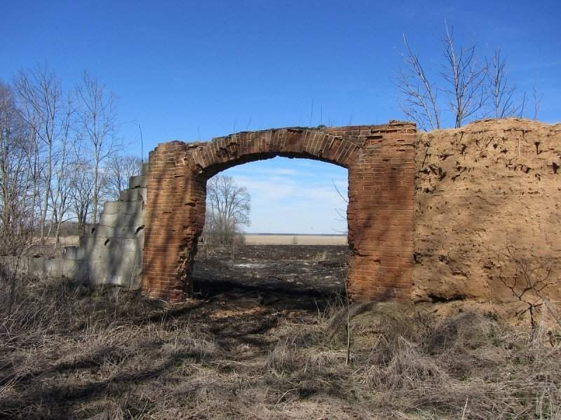 Браносава. Рэшткі сядзібы